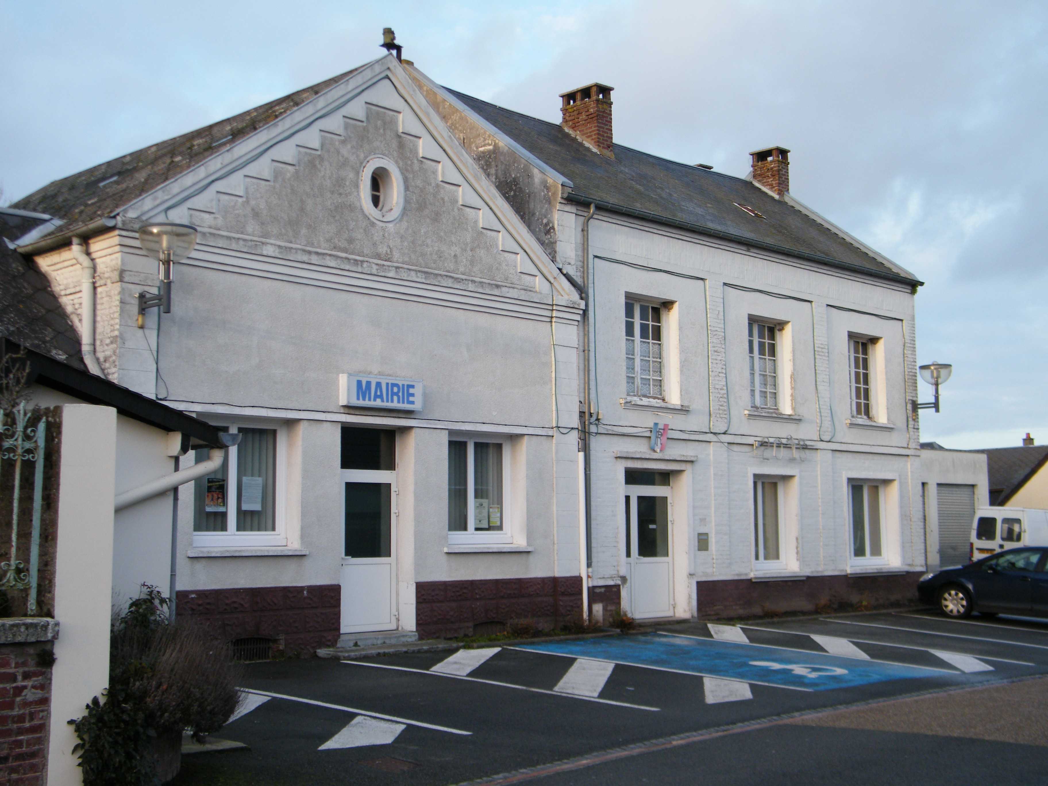 Mairie de Woignarue (Somme).